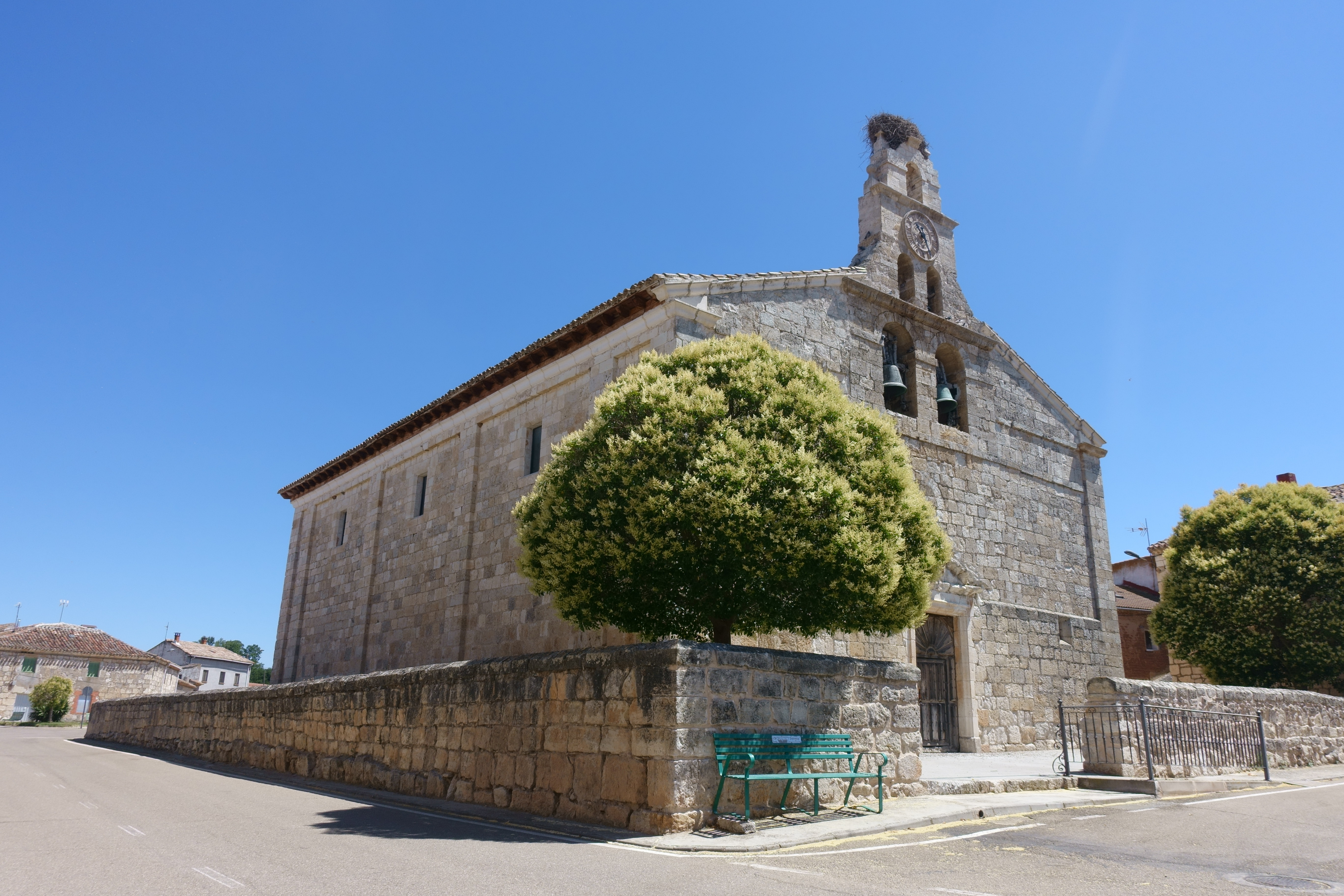 Iglesia de San Juan Bautista, en Peral de Arlanza (Burgos, España).